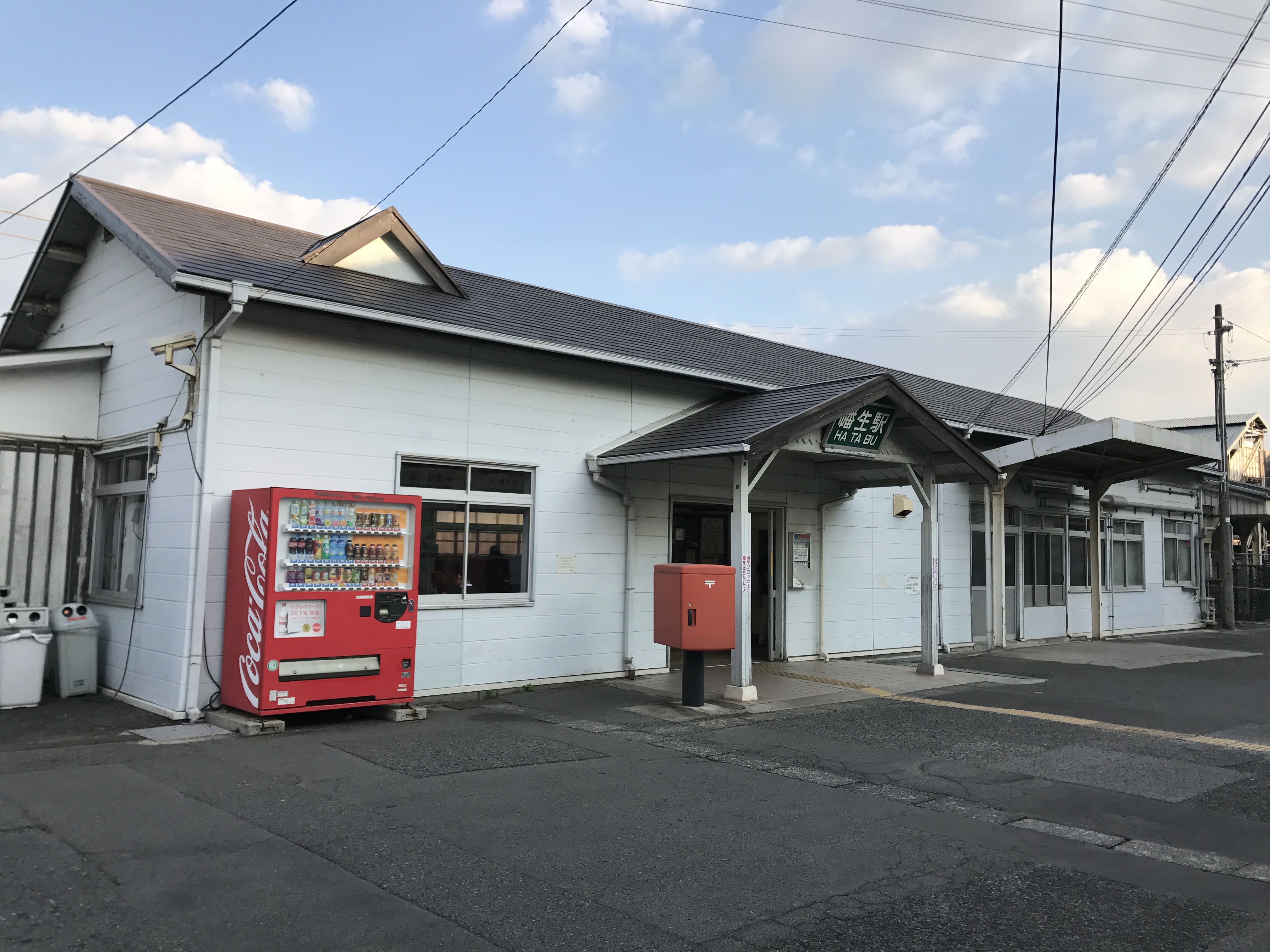 幡生駅駅舎